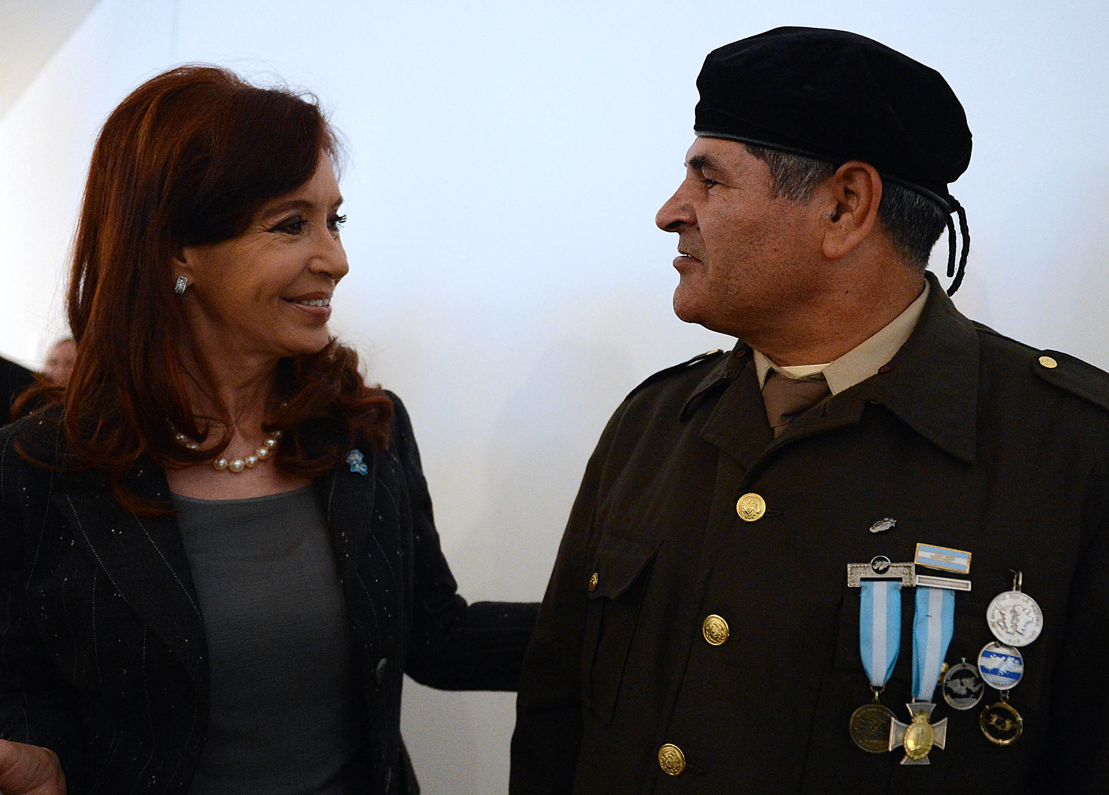 La presidenta Cristina Fernández junto con Oscar Poltronieri, héroe de la guerra de las Malvinas.